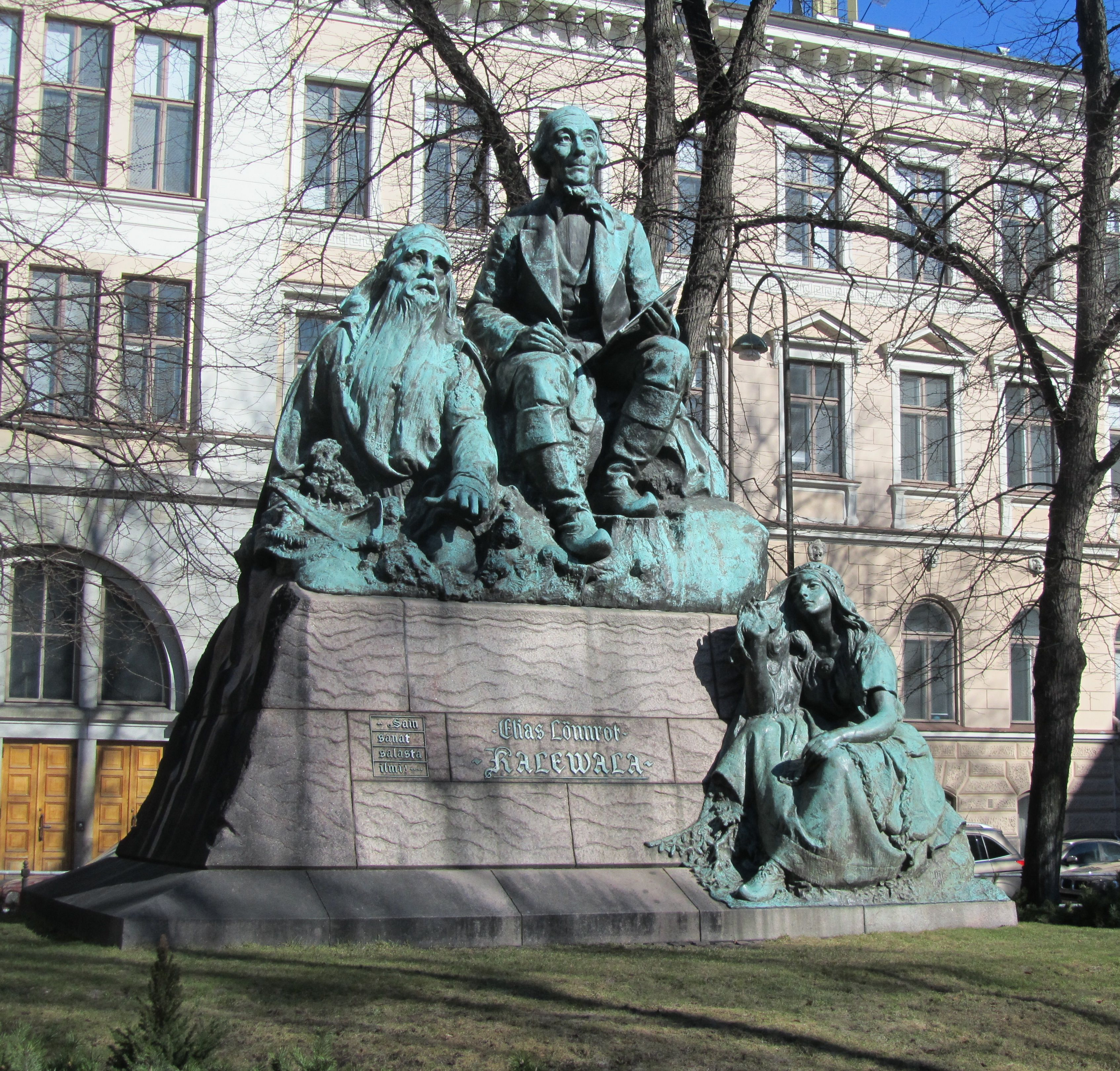 Elias Lönnrot (1902) - Emil Wikström. Sijainti: Lönnrotin puistikko, Lönnrotinkatu 5, Kamppi